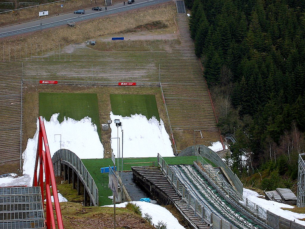 Schanzentisch der Hans Renner Schanze in Oberhof im April 2006